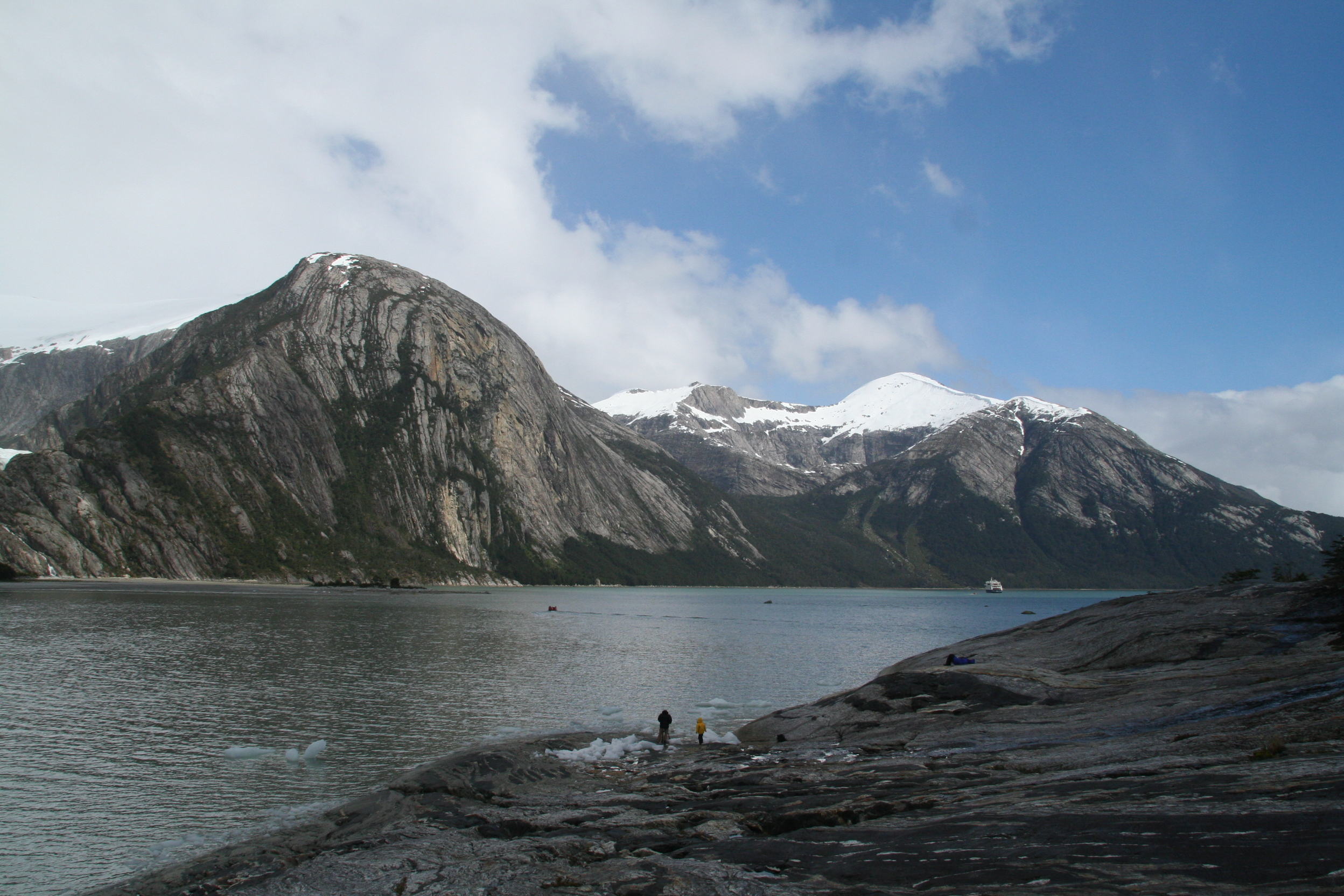 Seno Pía, Tierra del Fuego, Chile.